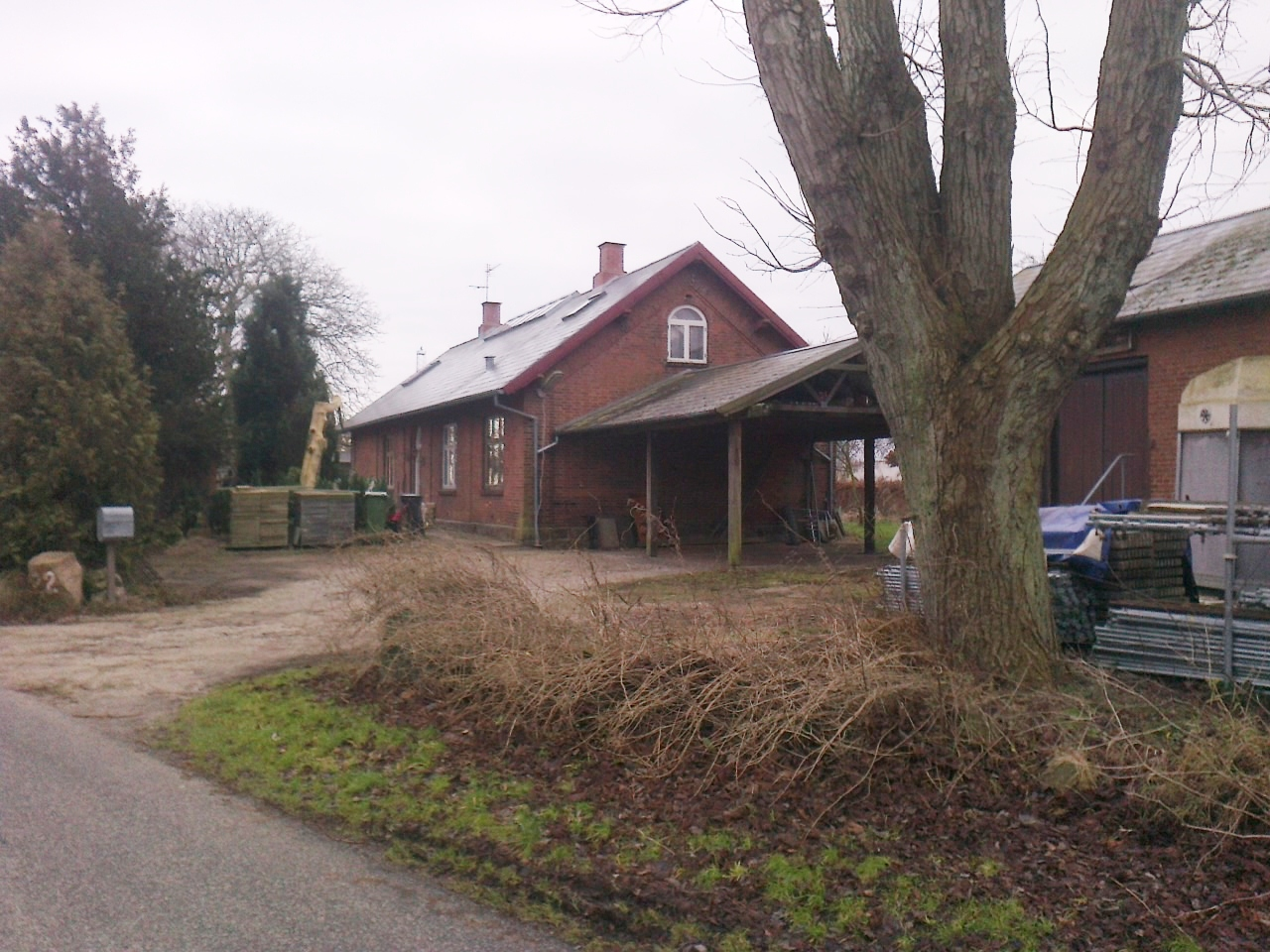 Boulstrup Station fra vejsiden